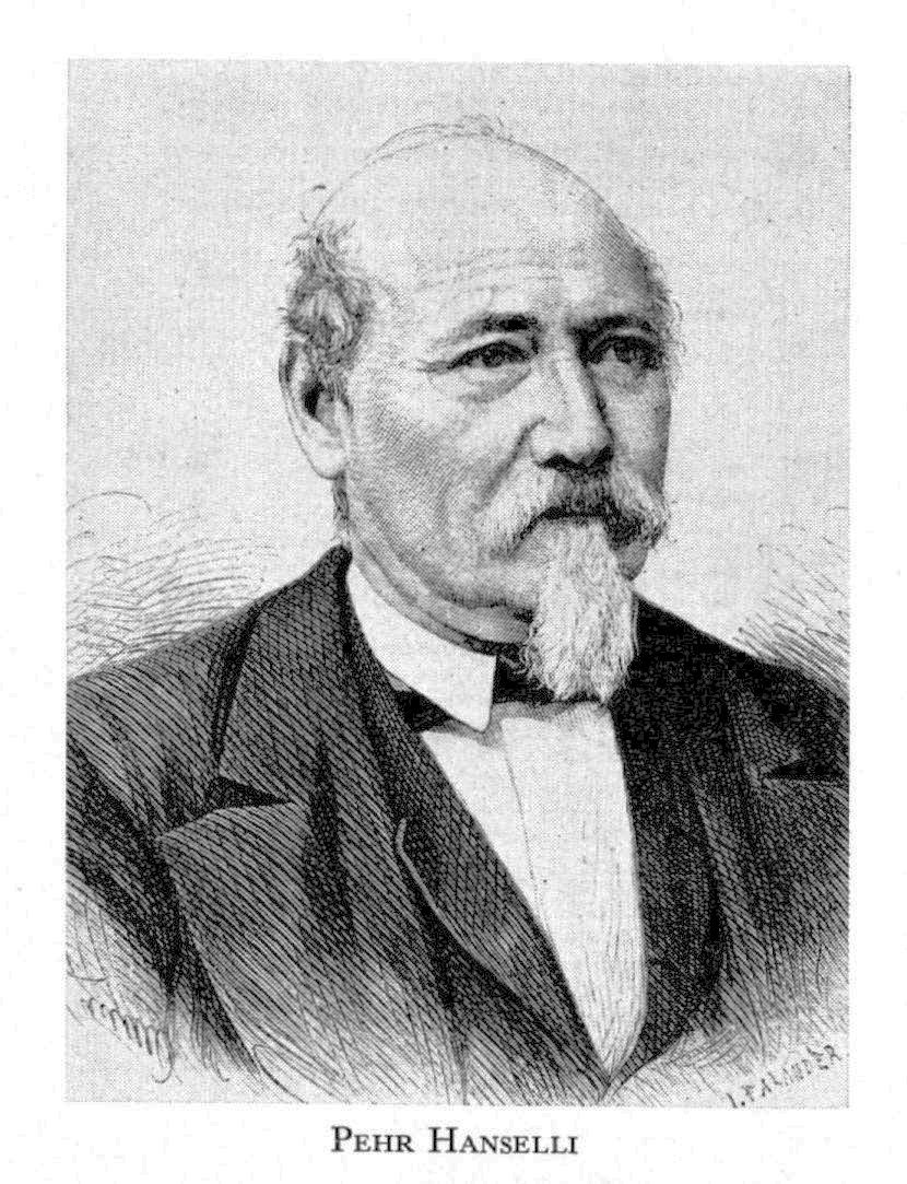 Per Hanselli (1815-1879)